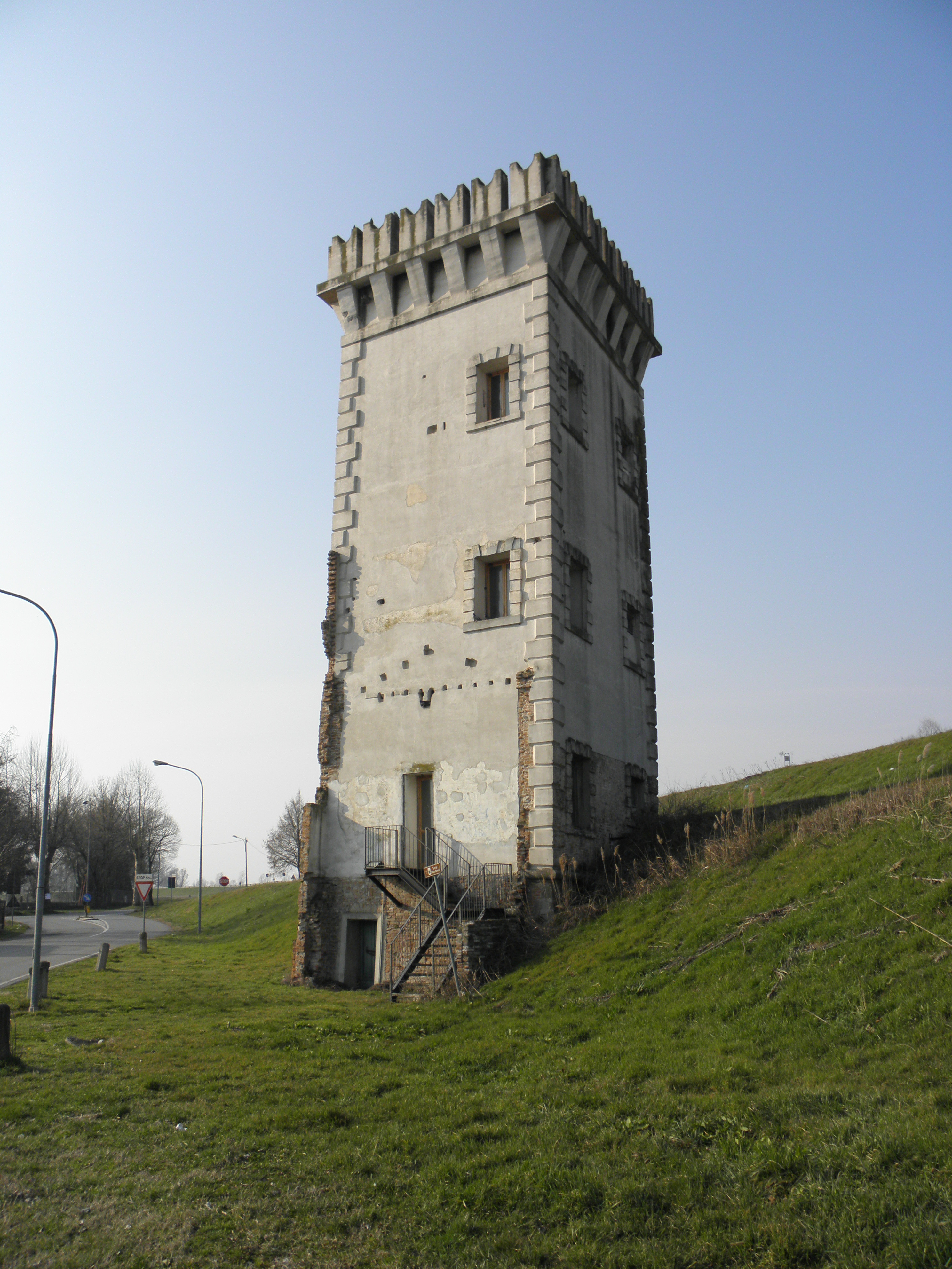 Lusia, Torre di Villa Morosini rimasta distrutta nei bombardamenti della seconda guerra mondiale.